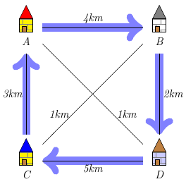 Problème du voyageur de commerce ː un chemin non optimal